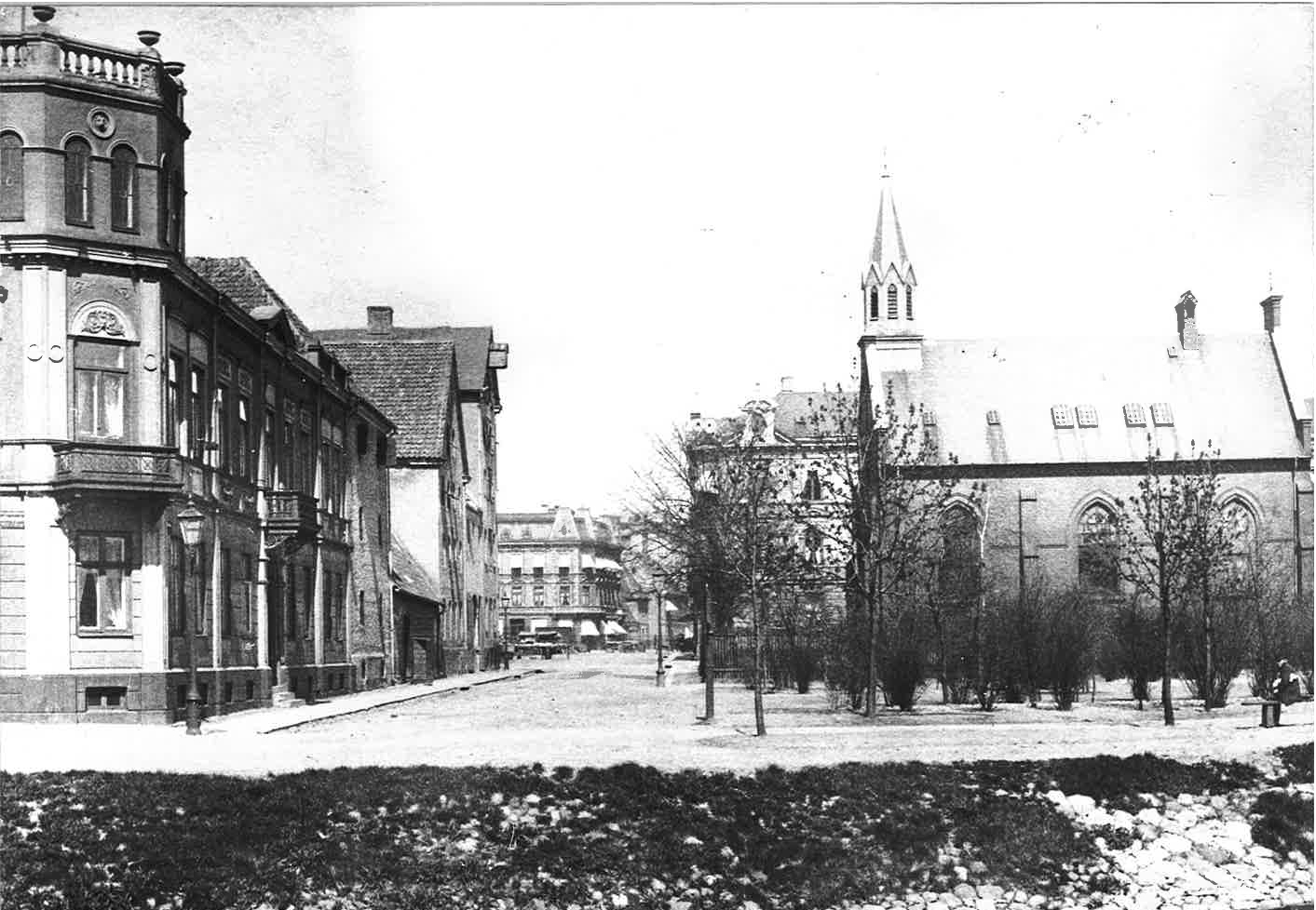 Kanalgatan i Malmö. Till höger gamla katolska kyrkan - gamla Vår frälsares kyrka - i Malmö. Till vänster David Lenanders bostadshus. Eftersom inte Trygghuset, som byggdes 1938, är med på bilden är fotot äldre än så.